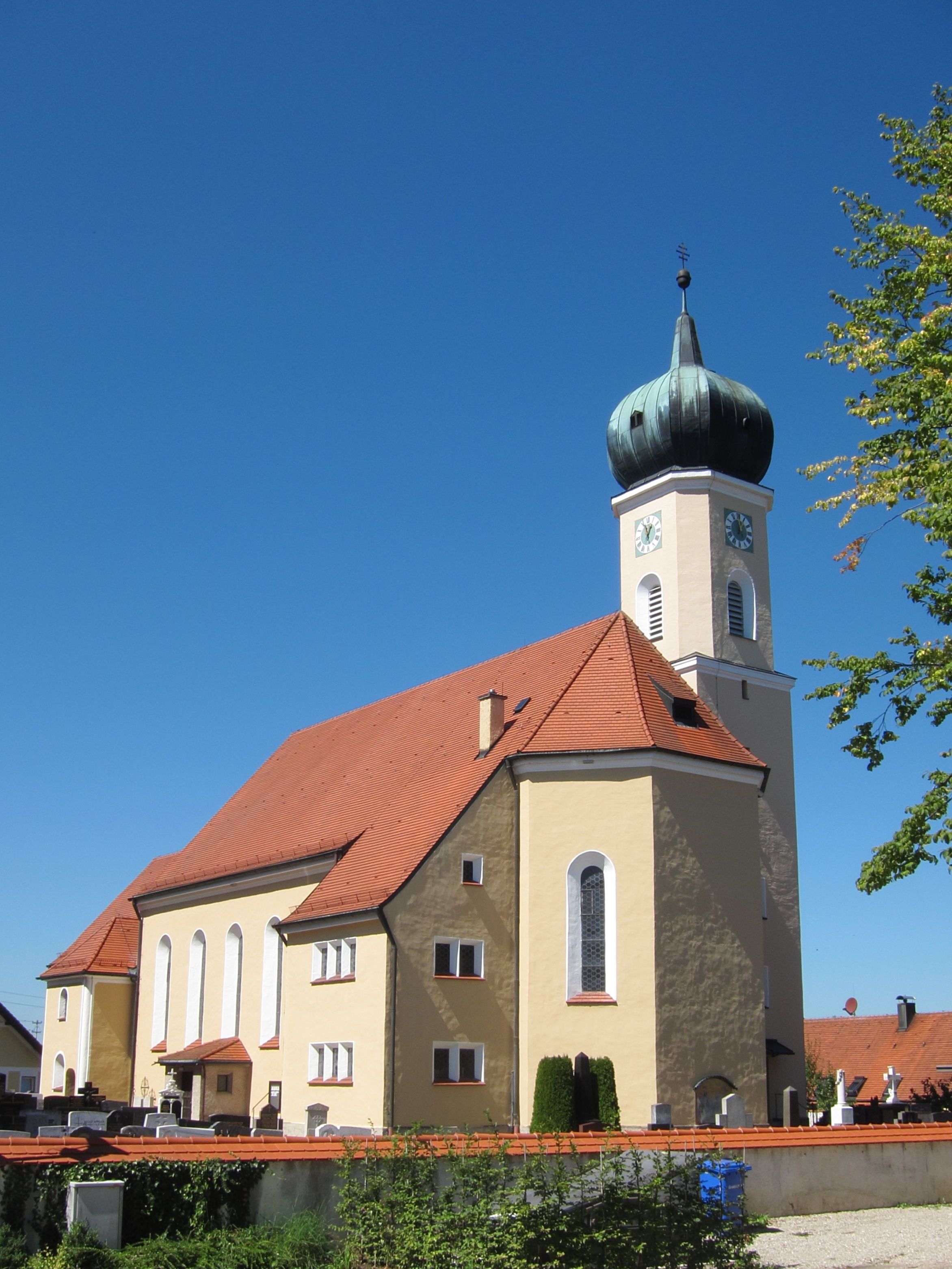 Katholische Pfarrkirche St. Emmeram, barocker Längsbau mit Zwiebelturm von Anton Kogler, um 1700, Erweiterung 1928; mit Ausstattung.